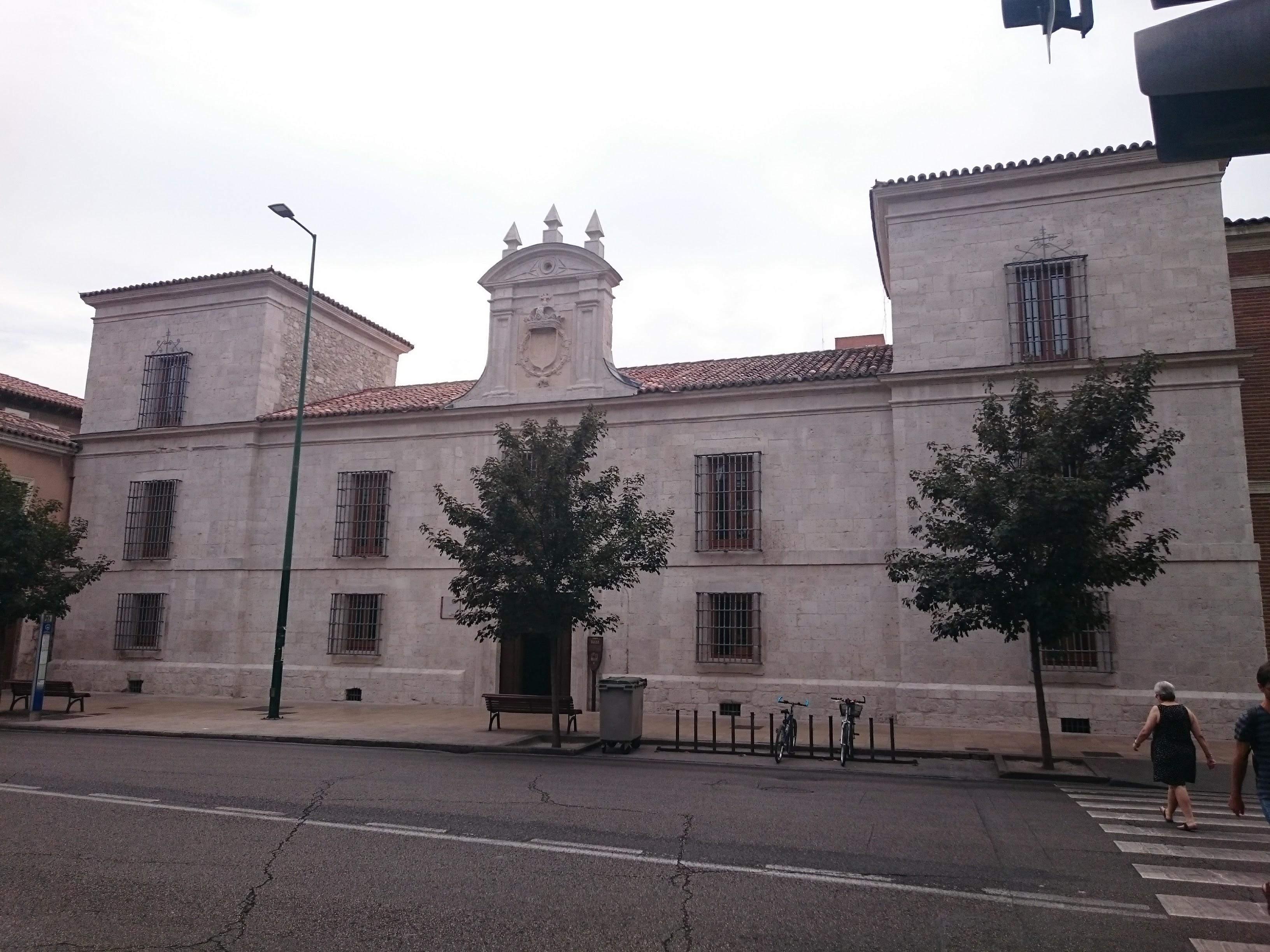 Biblioteca General Reina Sofía de la Universidad de Valladolid, ubicada en el edificio de la Cárcel Vieja de Chancillería